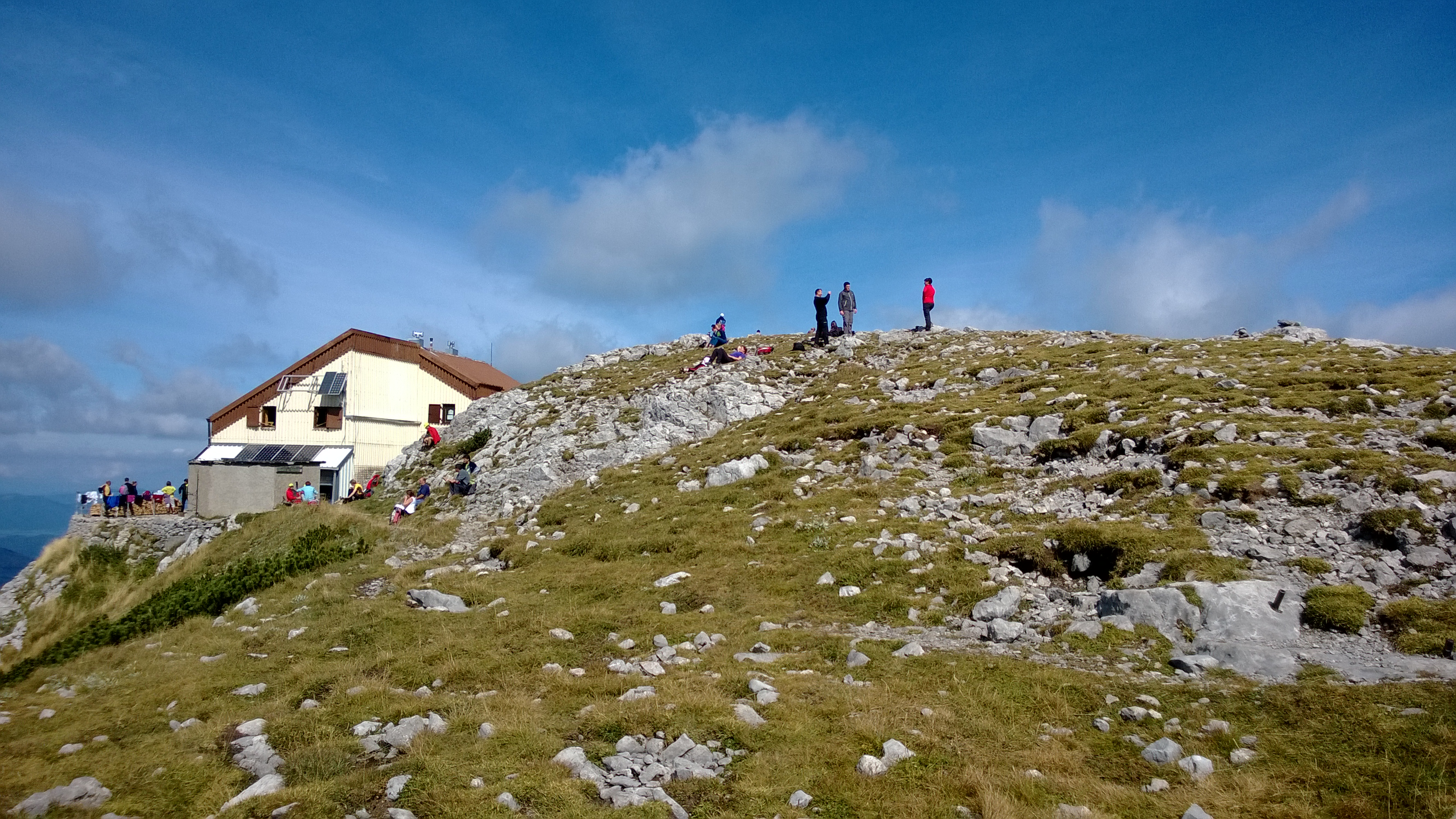 Ogo Wintendo Phone_20130922_018